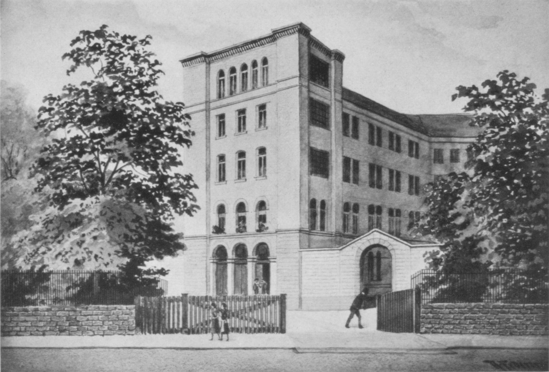 Ehemaliges Pönitentiarhaus in Stuttgart, Senefelderstraße 45. Aquarell von August Federer, um 1850.